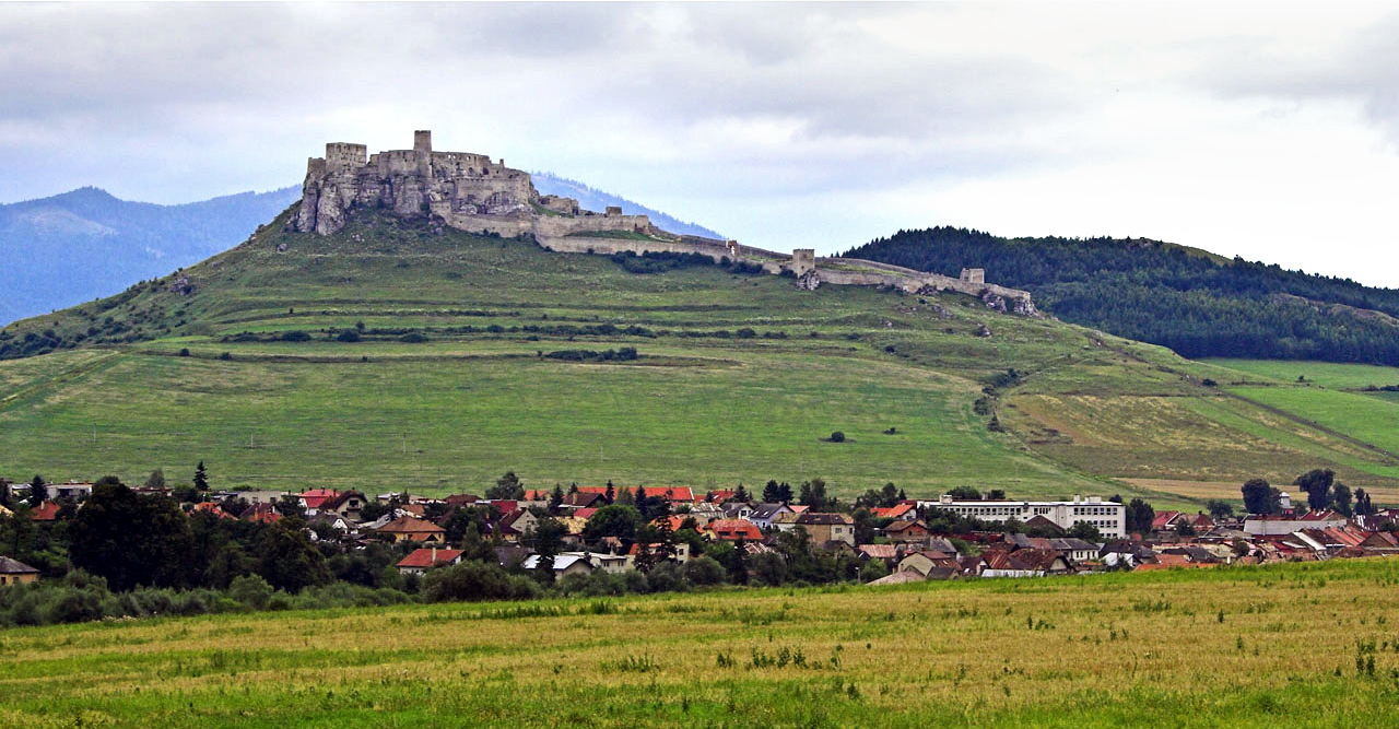 Spis Castle, Slovakia